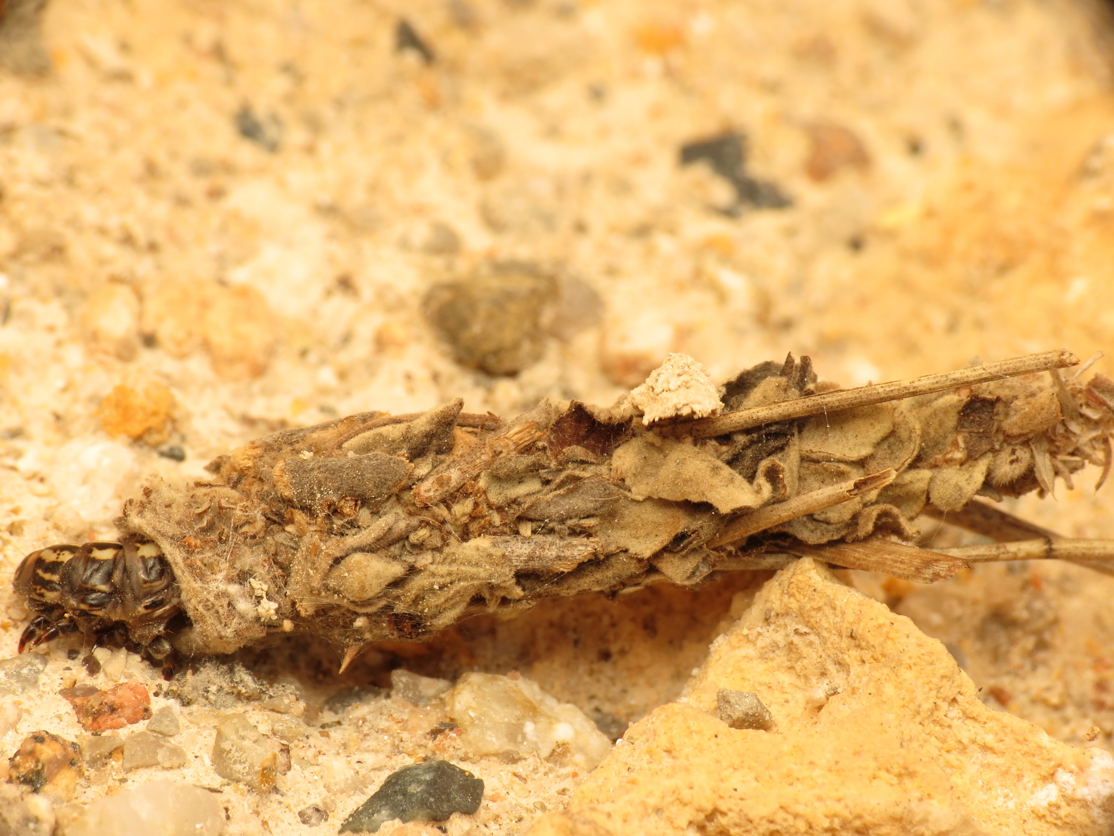 Canephora hirsuta (Poda, 1761), larva in case, Pont del Diable, Tarragona, Spain, 19 May 2013